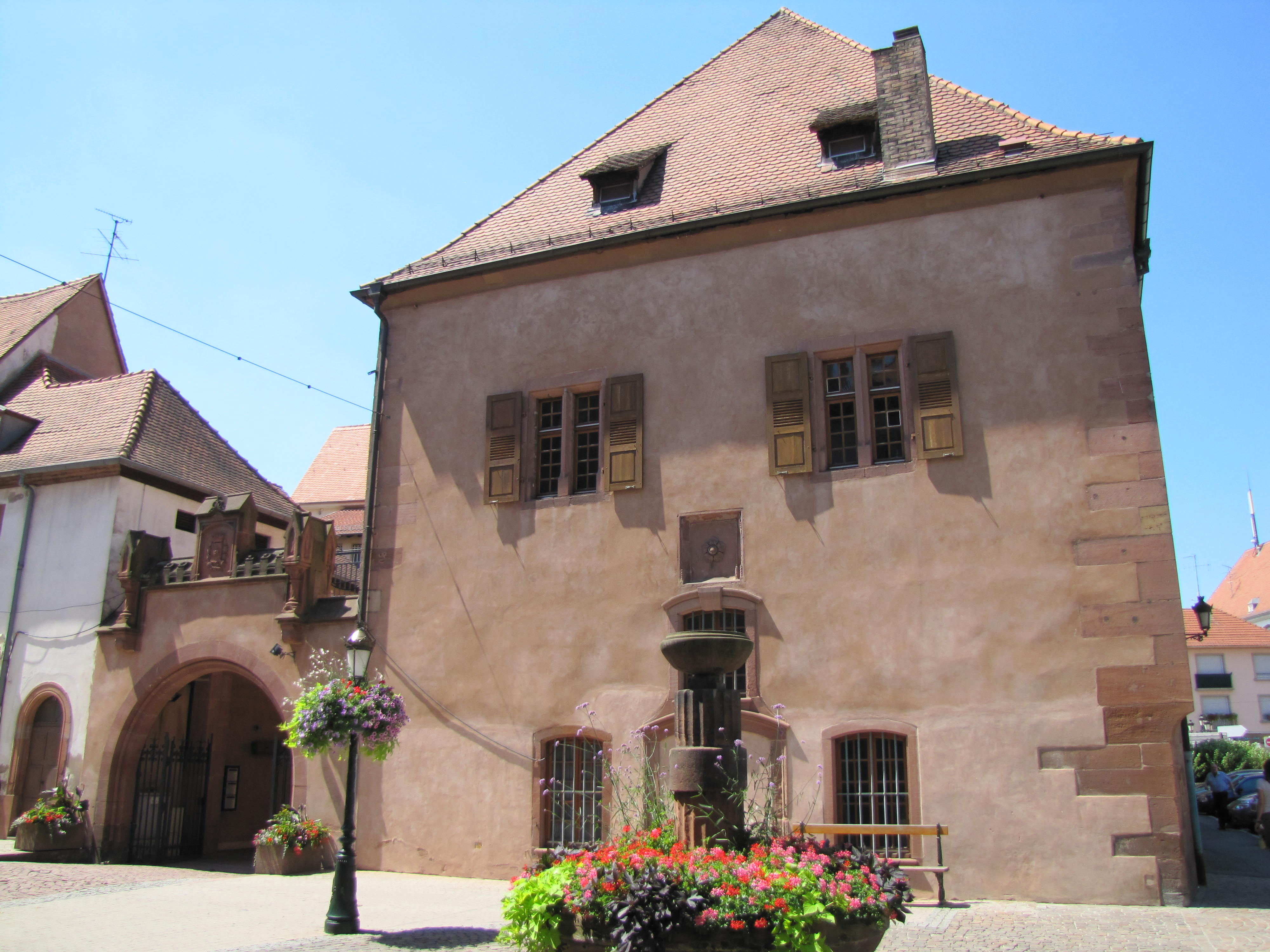 Alsace, Bas-Rhin, Haguenau, Ancienne Douane (XVIe), 16 place d’Armes (IA00061919)